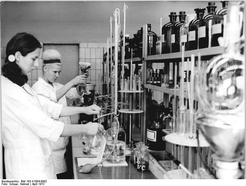 ADN-ZB / Schaar / April 1972 [Herausgabedatum] / 8-72 / Umweltschutz in der DDR Im Abwasserlabor des VEB Chemiekombinat Buna (Bezirk Halle) werden die Abwässer des Betriebes auf ihre Abweichungen von den geltenden Grenzwerten untersucht.